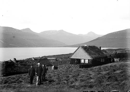 Oyri, Faroe Islands